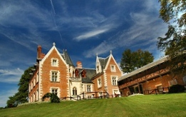 Le Château du Clos Lucé, demeure de Léonard de Vinci à Amboise Photographie de Léonard de Serres